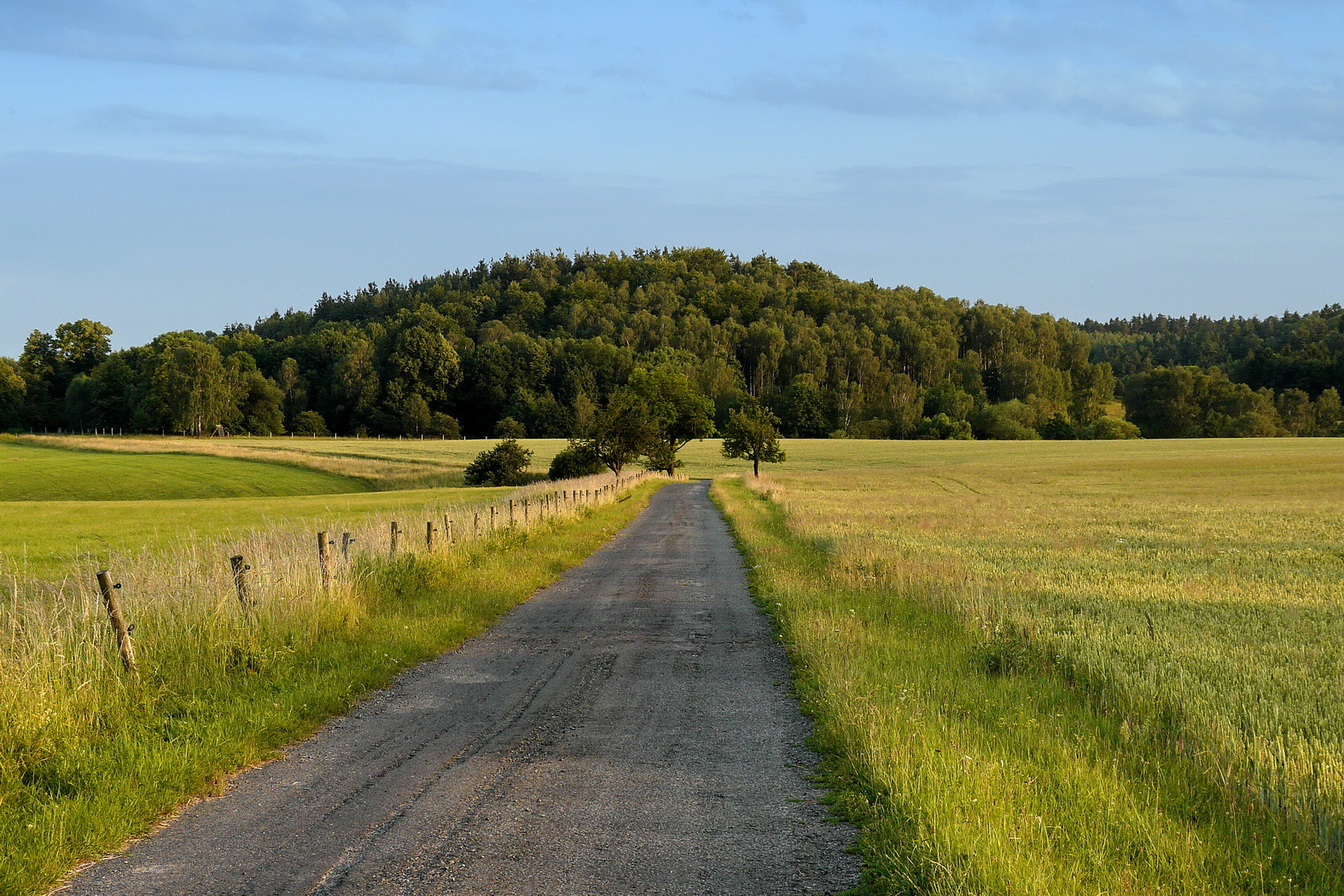 Lanův kopec, cesta do obory Židlov